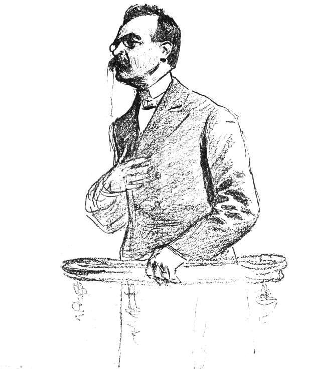 "M. Crépieux-Jamin." (Treizième audience du procès Zola)